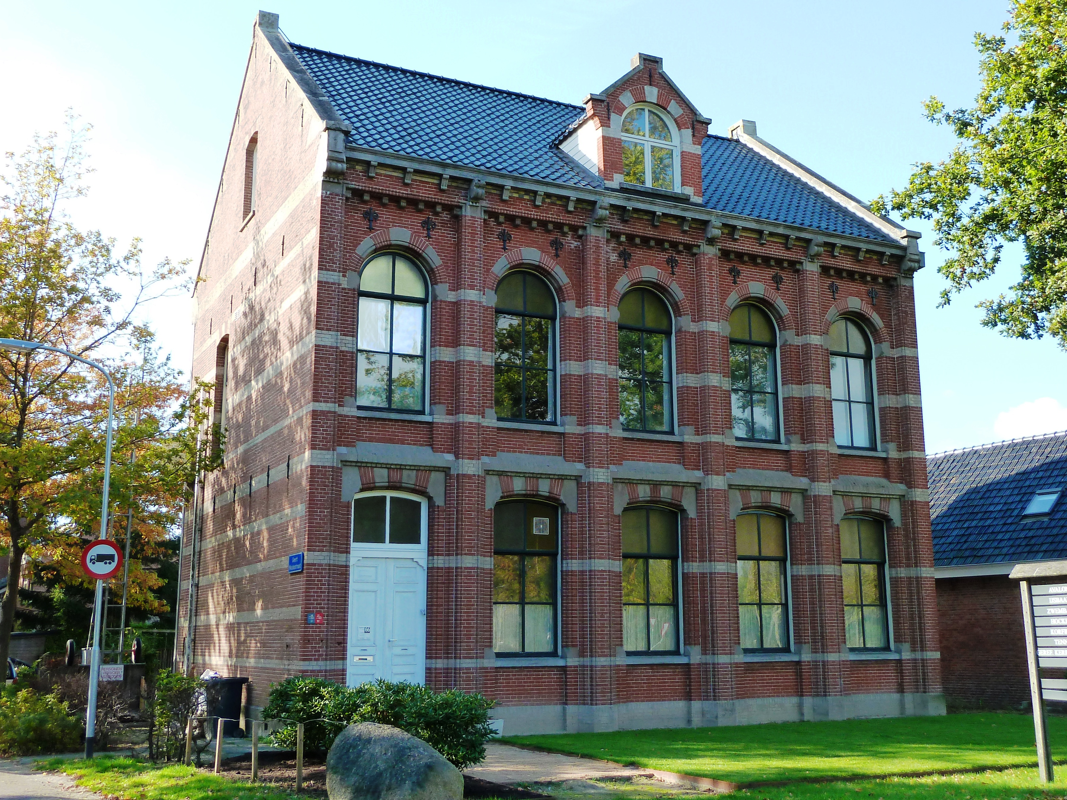 Voormalige kantongerecht van Zuidhorn. Gebouwd in 1883 in eclectische stijl met neo-gotische elementen naar een ontwerp van rijksbouwmeester Johan Metzelaar. In 1933 beëindigde het kantongerecht haar werkzaamheden. Later was er tot 2008 de muziekschool Westerkwartier gevestigd.